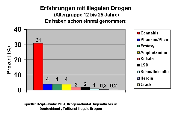 Drogenerfahrung "Jugendlicher", BzGA-Studie, 2004, Germany.